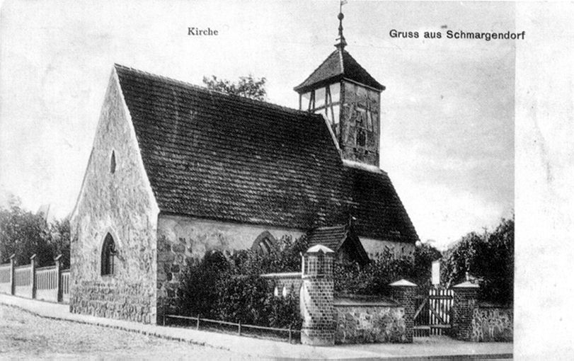 Ansichtskarte der Dorfkirche Schmargendorf von 1908